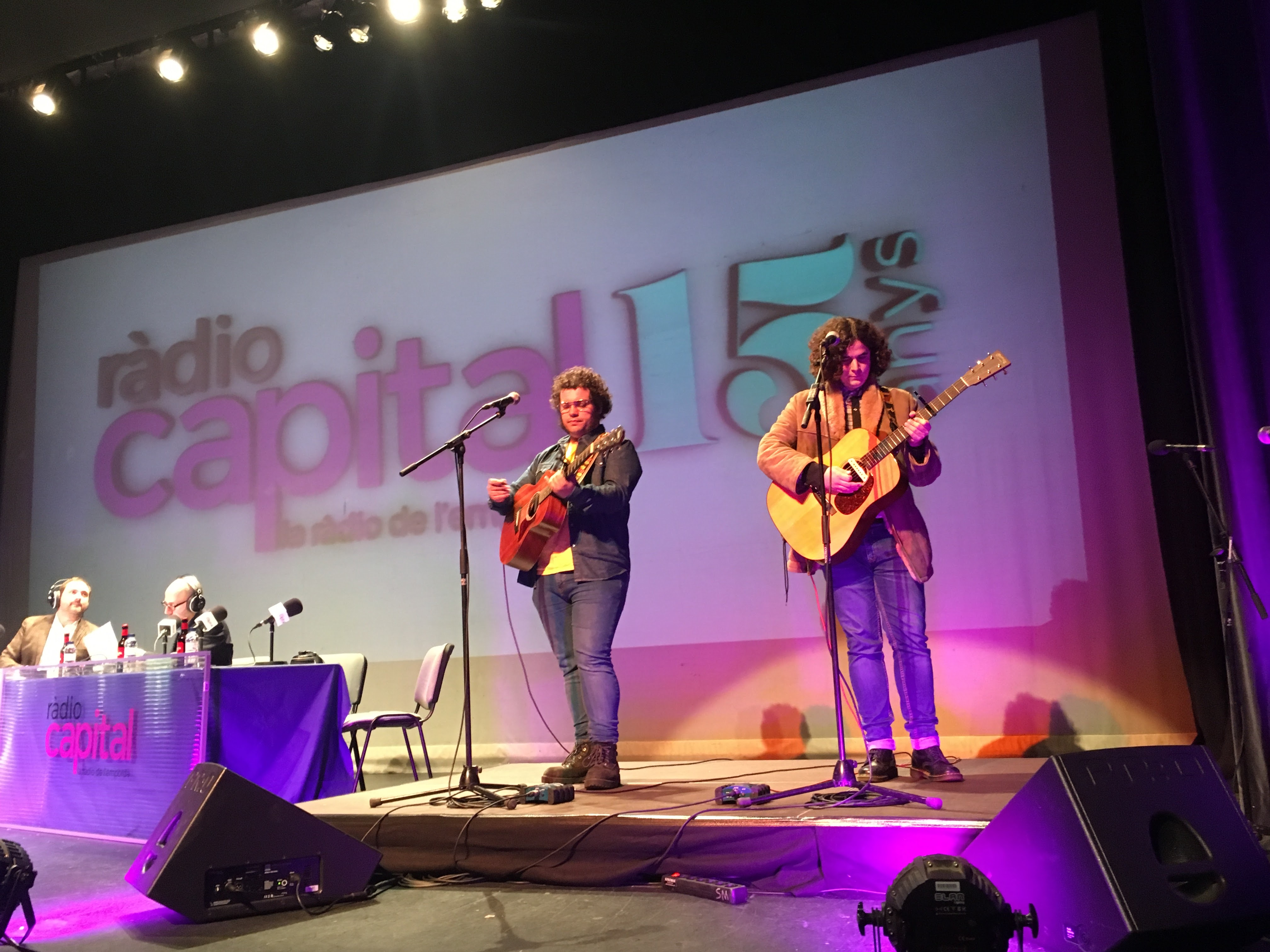 Programa especial Ràdio Capital 15 anys: Cultura · Territori · Ràdio, emès en directe des del Teatre Municipal de Palafrugell. Copa Lotus